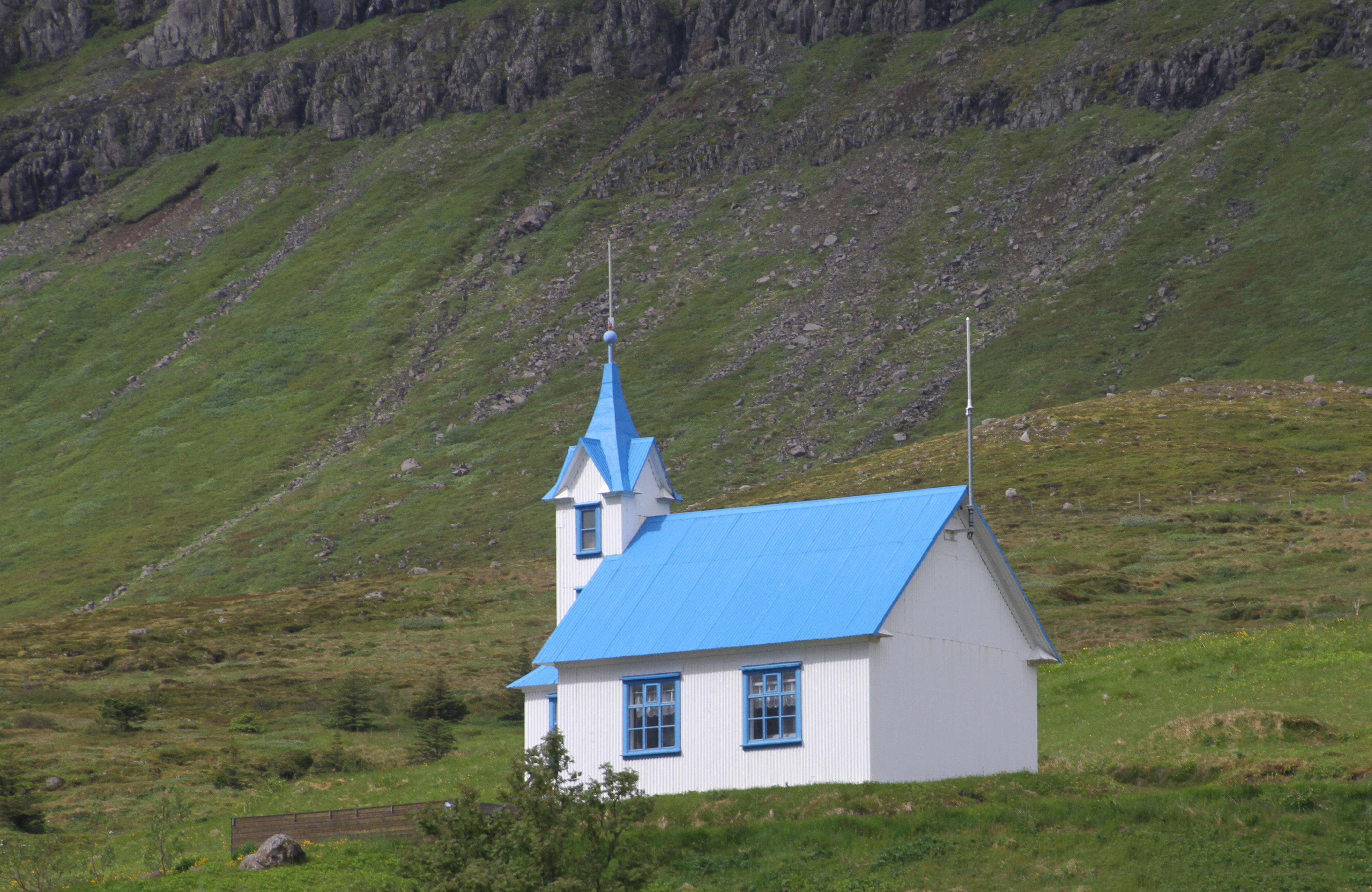 Stöðvarfjörður